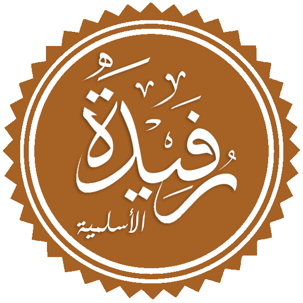 رفيدة الأسلمية صحابية وصاحبة الخيمة الطبية الأولى في الإسلام